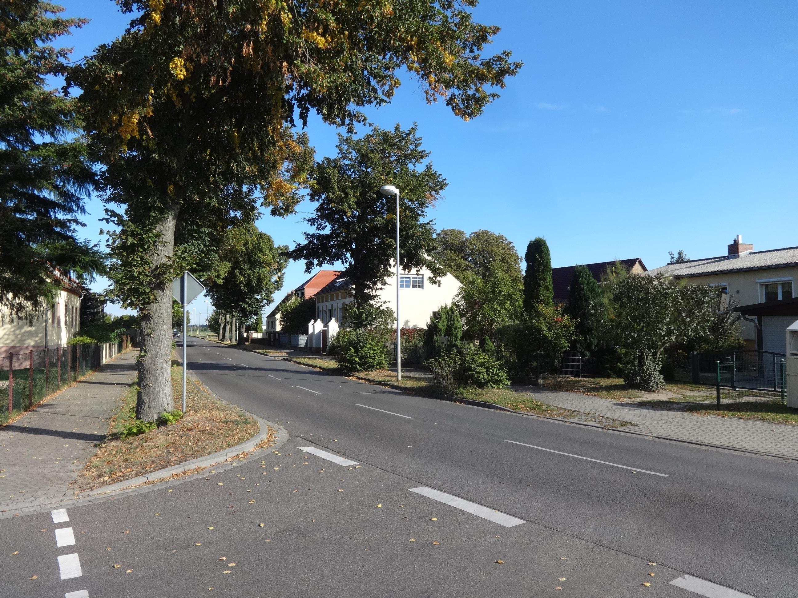 Wiesenhagen, ein Ortsteil der Stadt Trebbin im Landkreis Teltow-Fläming in Brandenburg